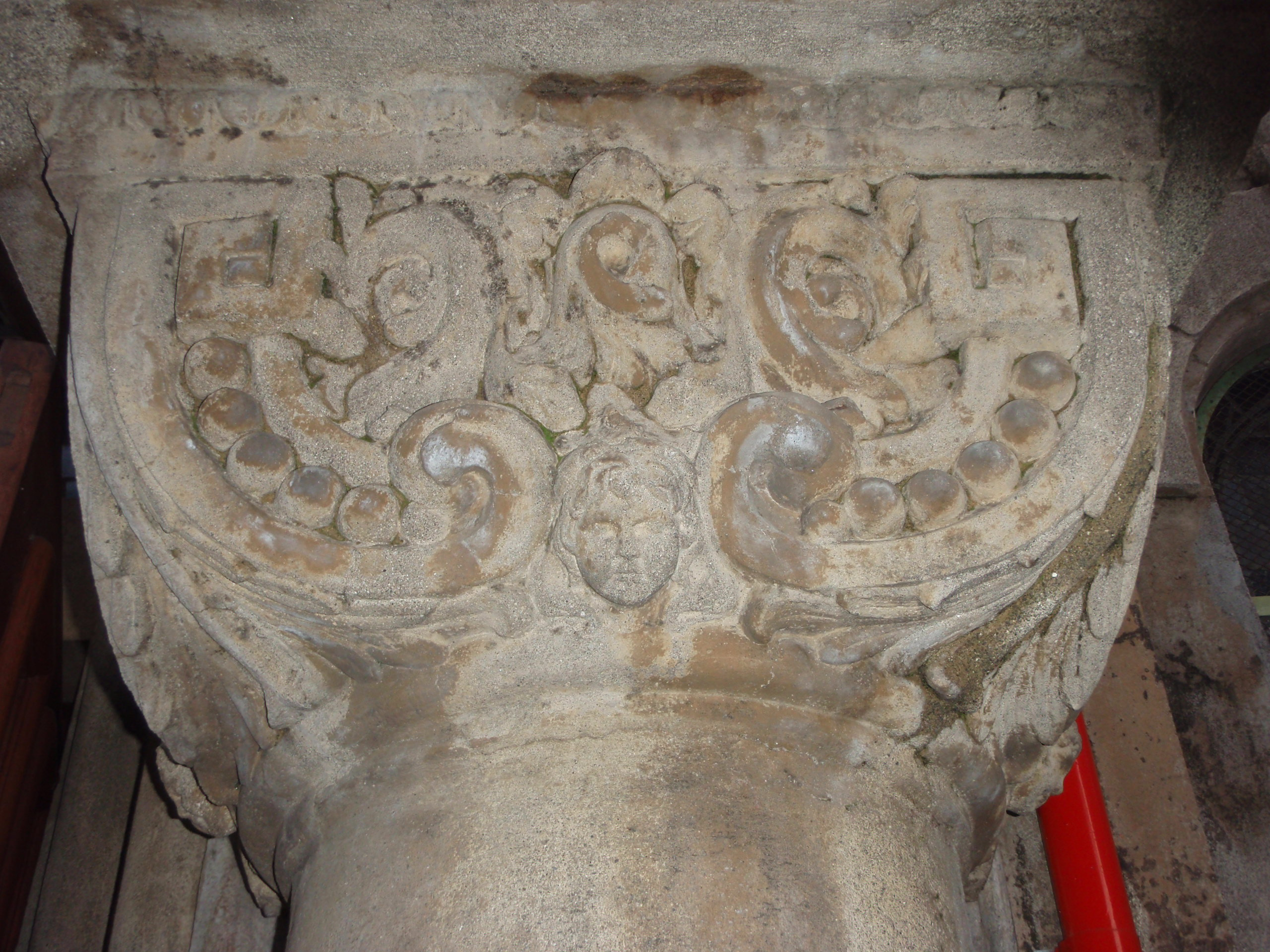 Iglesia San Francisco de Valdivia This is a photo of a national monument in Chile: 2005